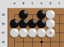 Kétszemű élő csoport góban